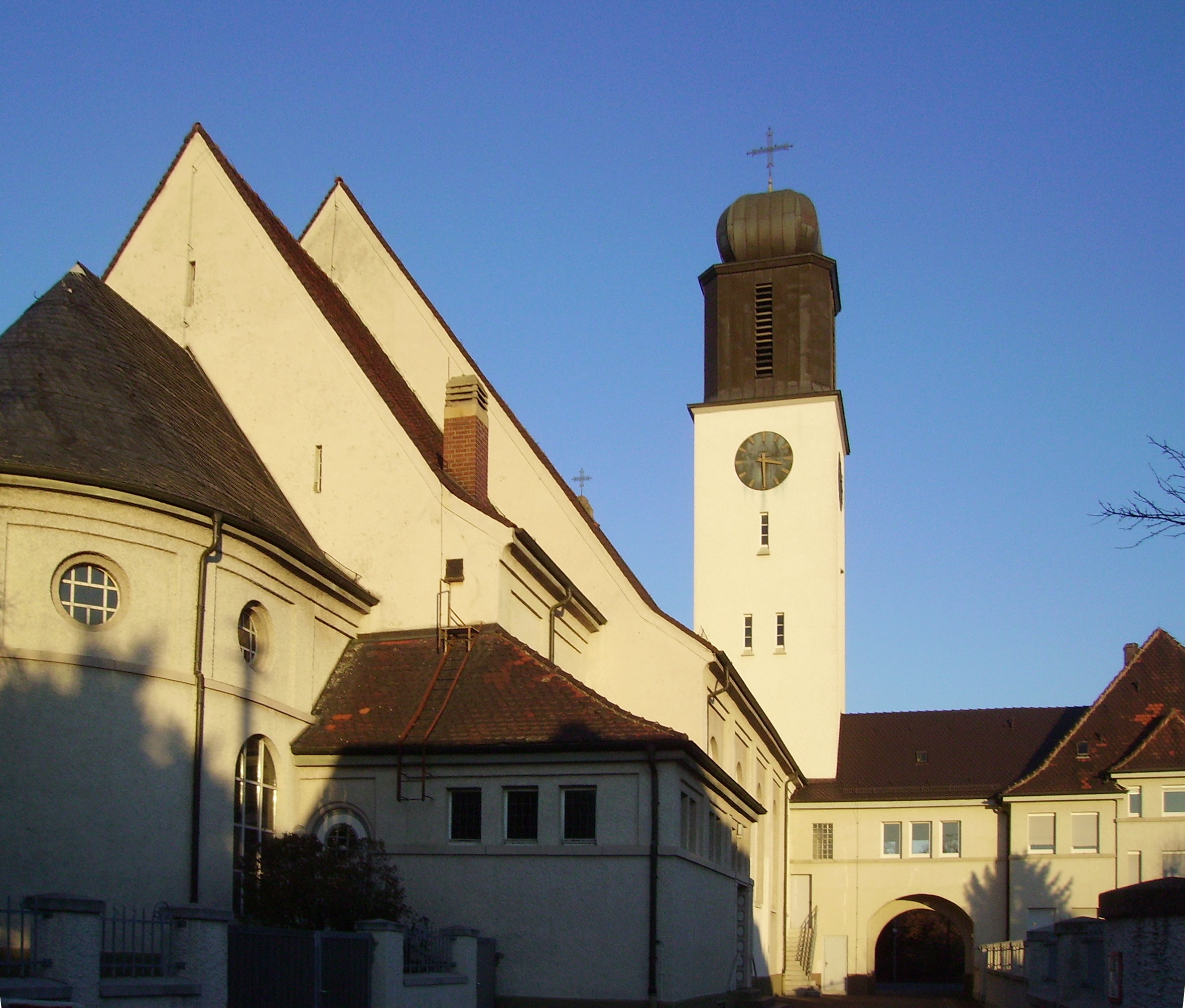 St. Joseph Ludwigshafen-Rheingönheim